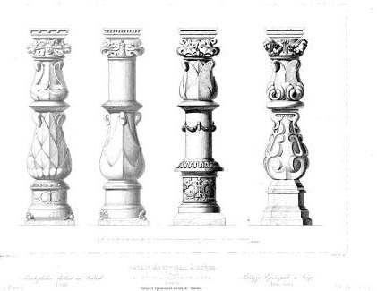 Dessins des Colonnes du Palais de Liège 1ère cour